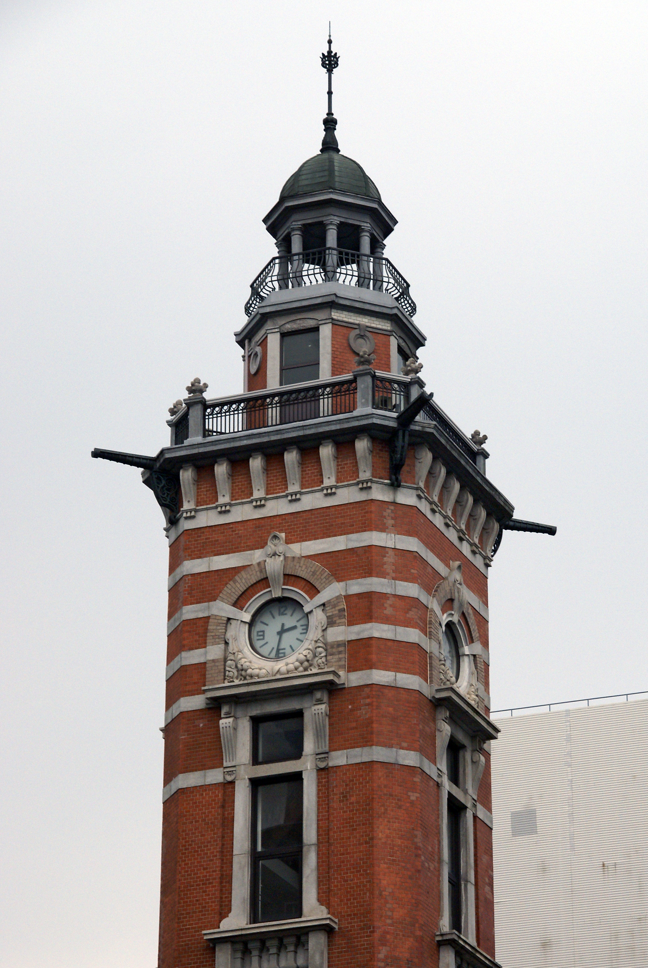 Yokohama Port Opening Memorial Hall in Yokohama, Japan